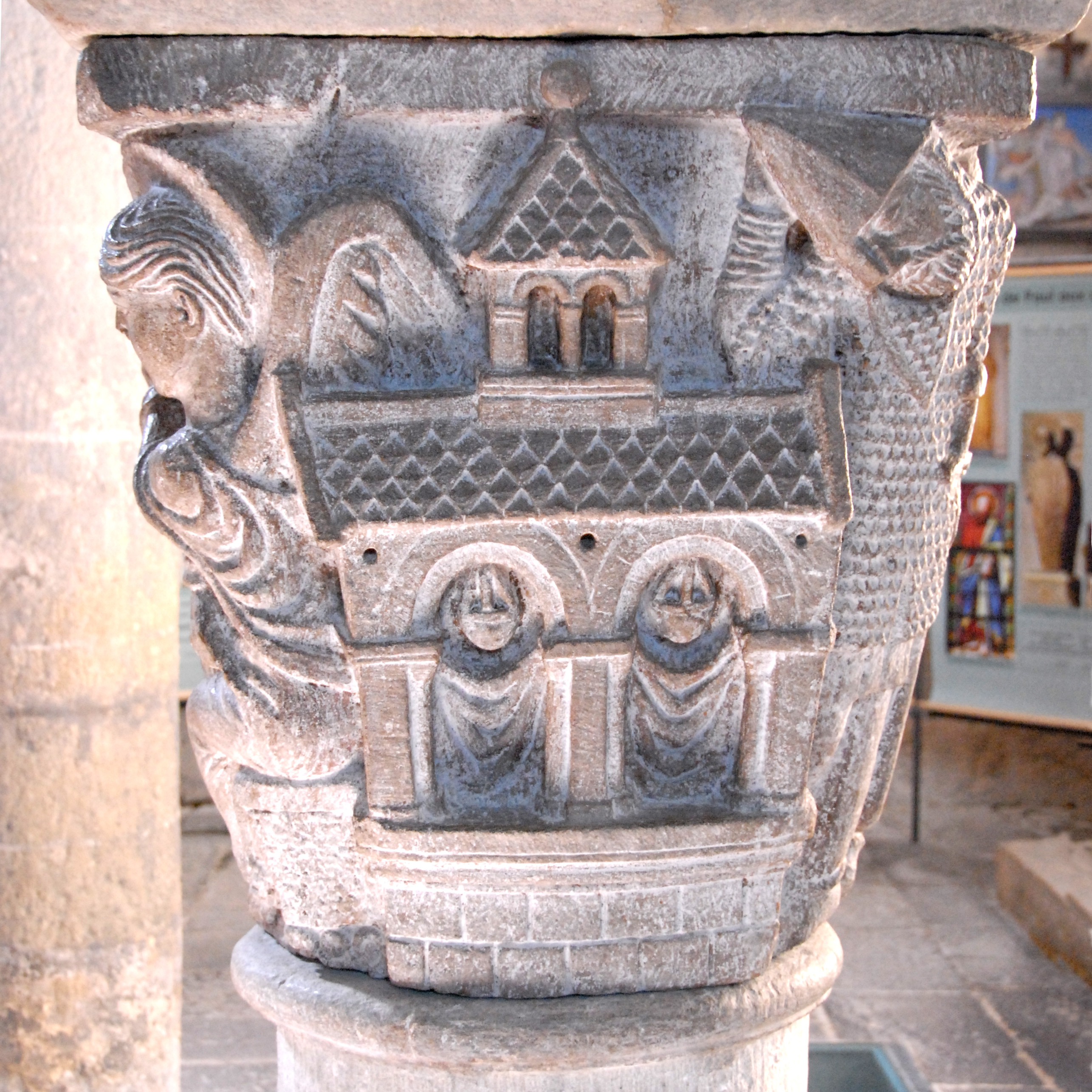 Mozac, Kapitell 2, Auferstehung, Sarkophag, ein Tempel